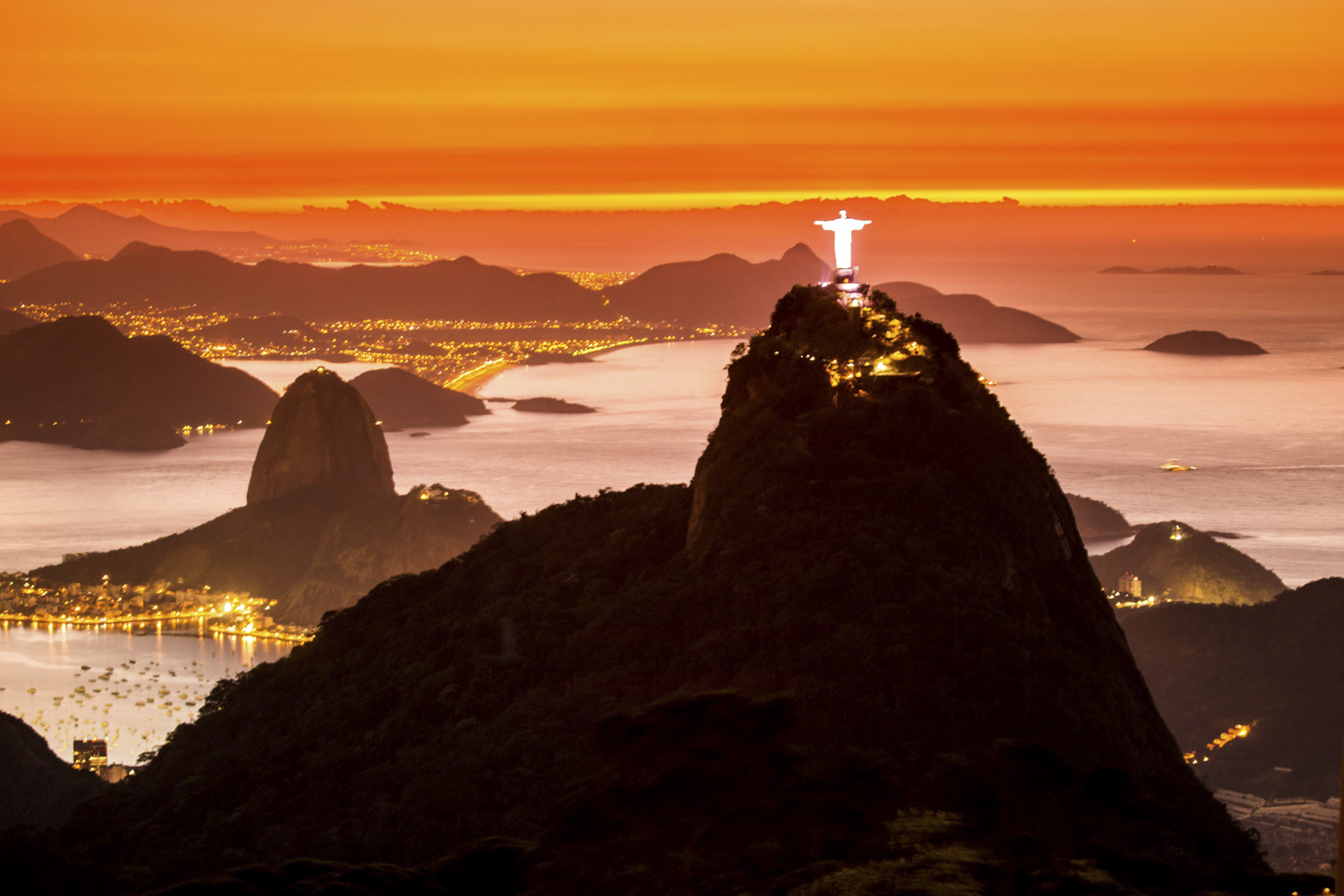 Os primeiros raios do sol iluminam o Cristo.